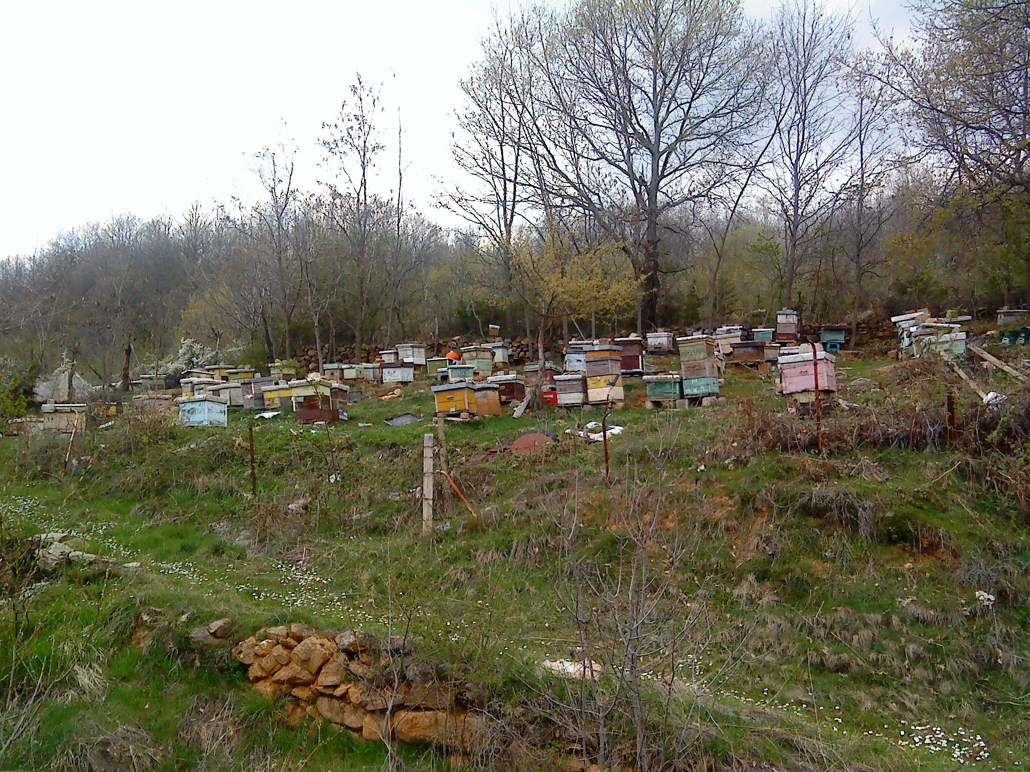 Пчелатство с.Кажани